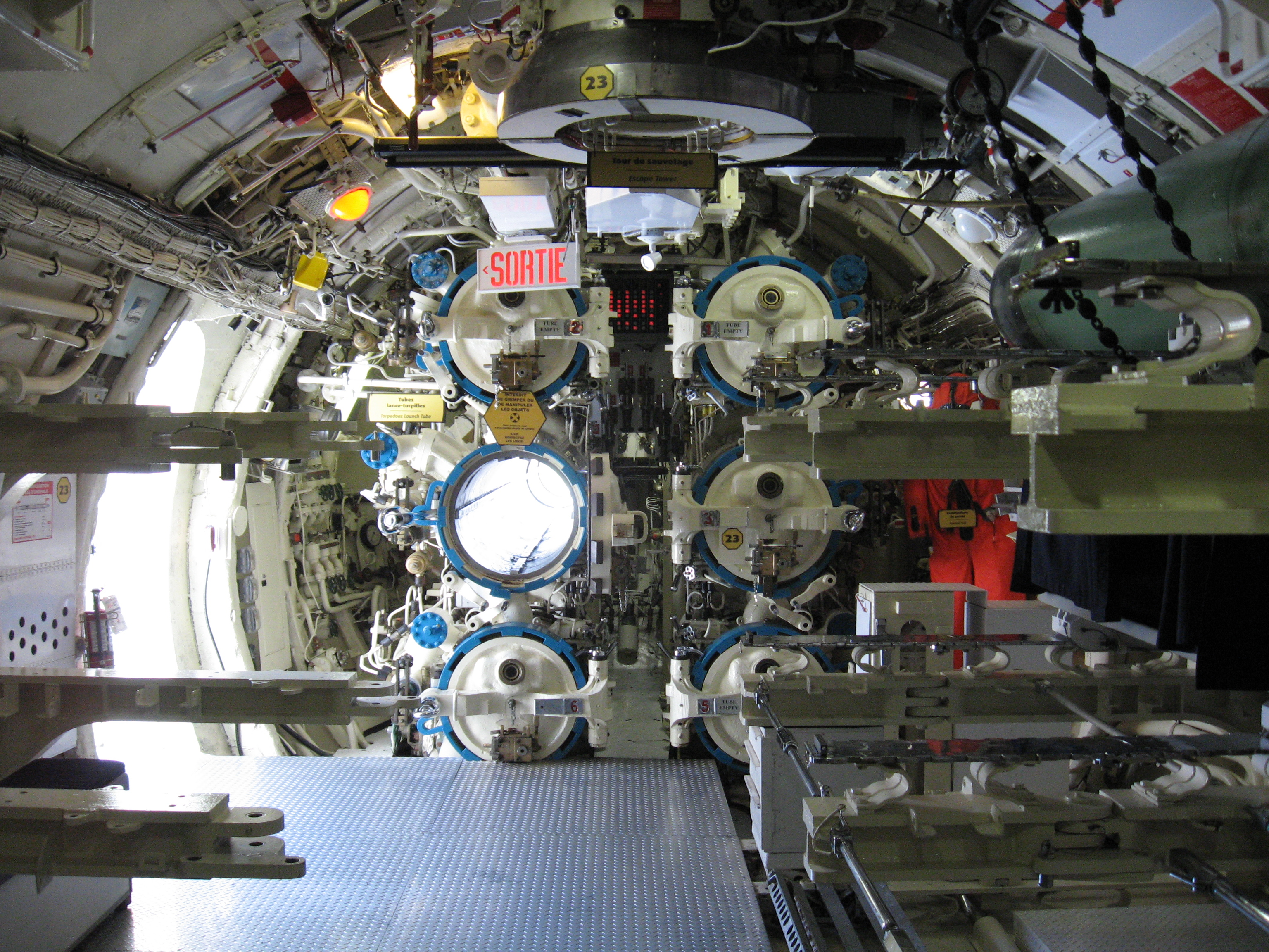 Salle des torpilles du NCSM Onondaga